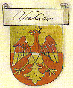 Stemma della famiglia Valier